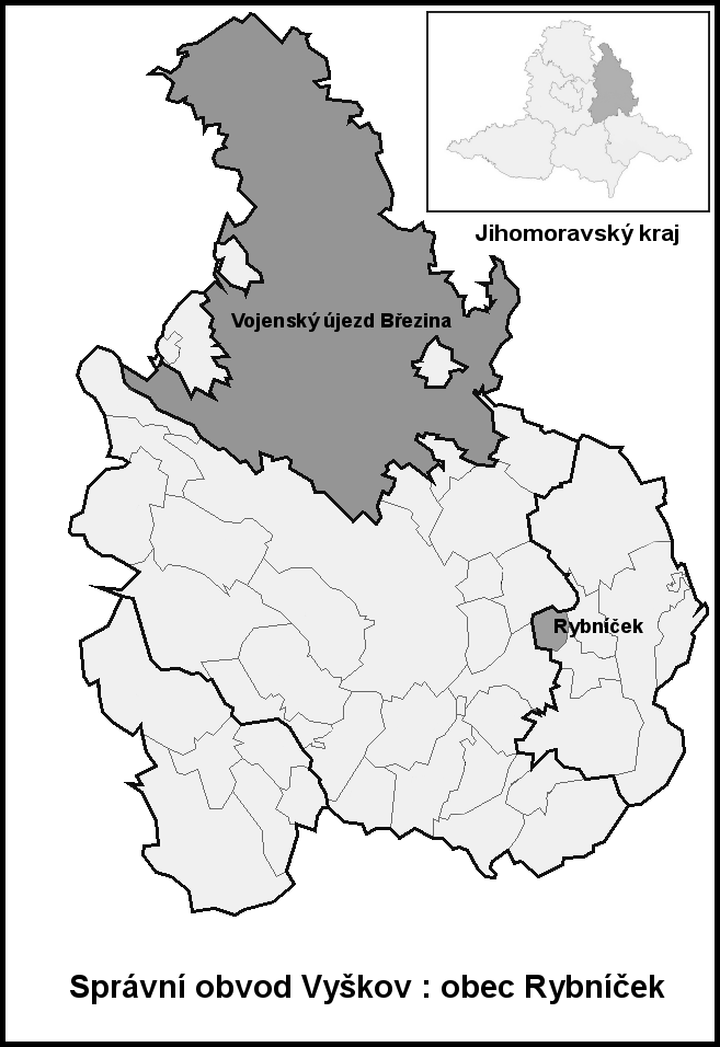 Hranice Rybníček (Vyškov- czech republic)